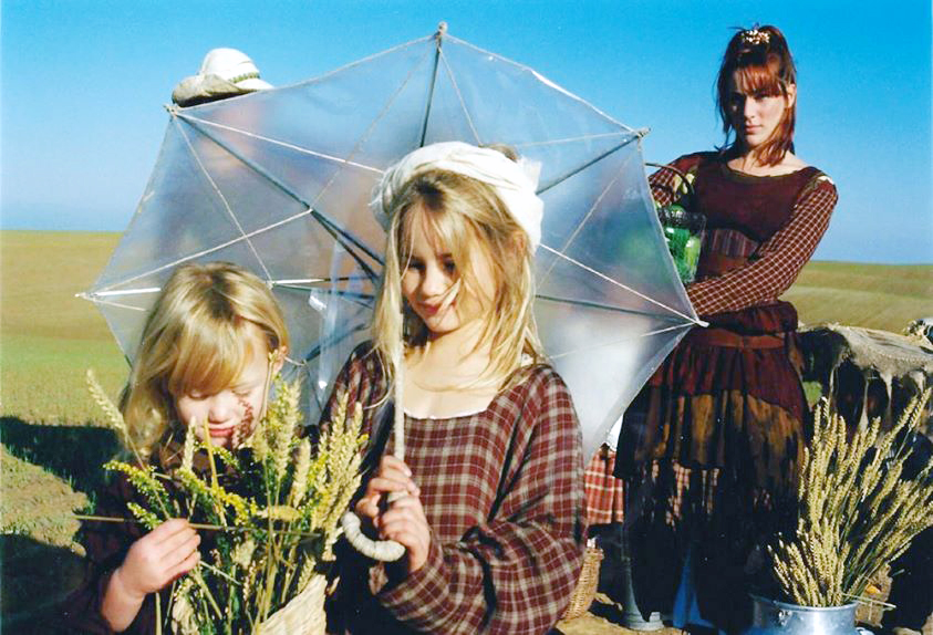 מתוך סרט פרסומת ל"טבעול" הפקה של ענת עוז